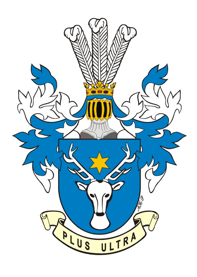 Jerzysław (herb szlachecki).